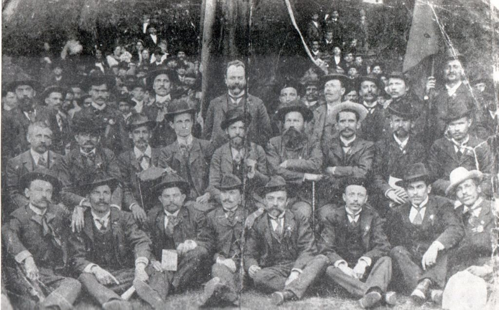 Učesnici prvomajske proslave 1905. u Beogradu. U drugom redu sede srpski socijalisti Radovan Dragović, Nikola Veličković i Dragiša Lapčević.